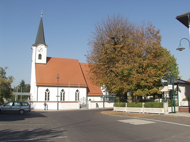 Kirche und Ortszentrum Pucking / Upper Austria